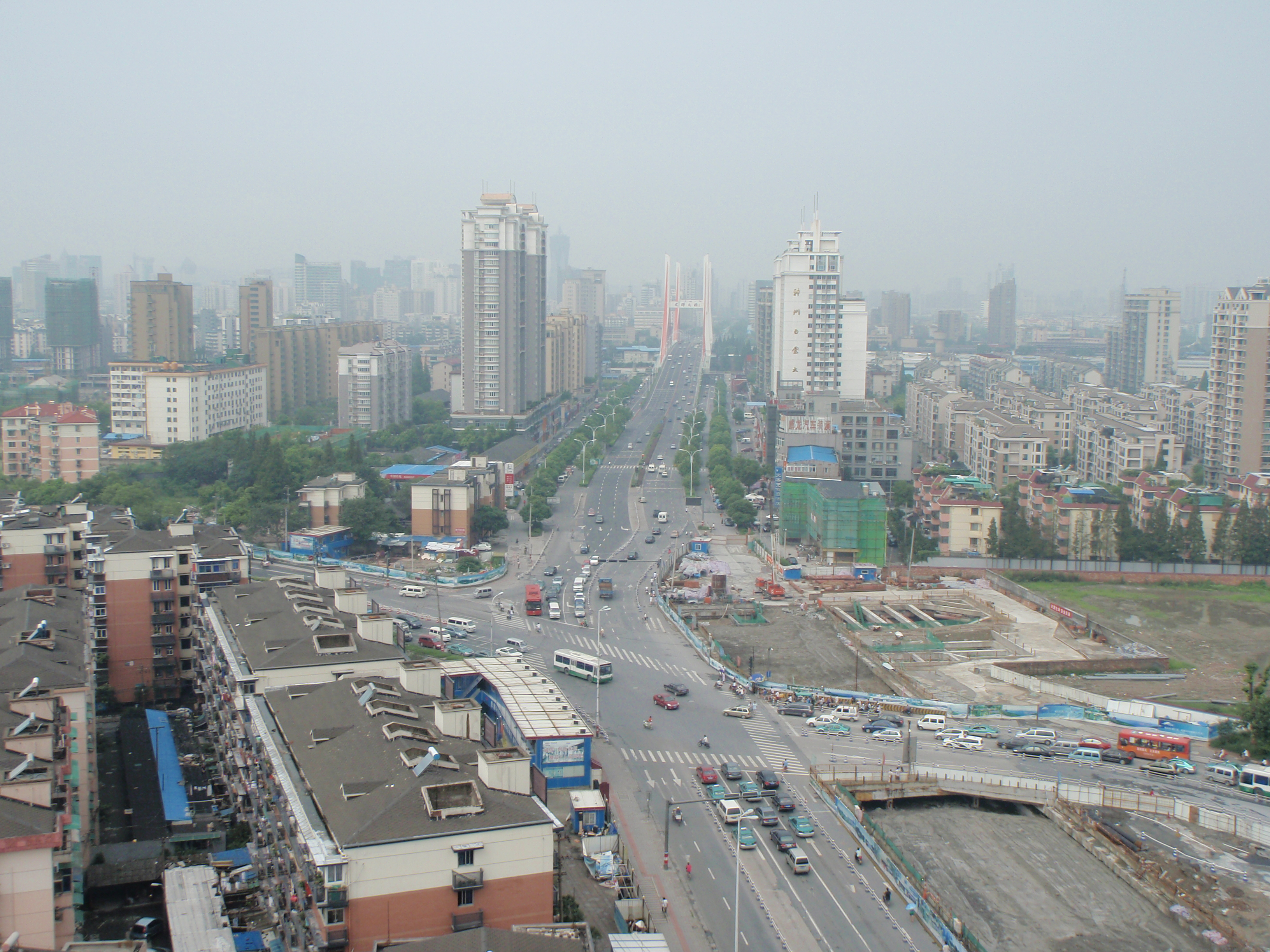 海景大酒店鸟瞰机场路与天成路交叉路口